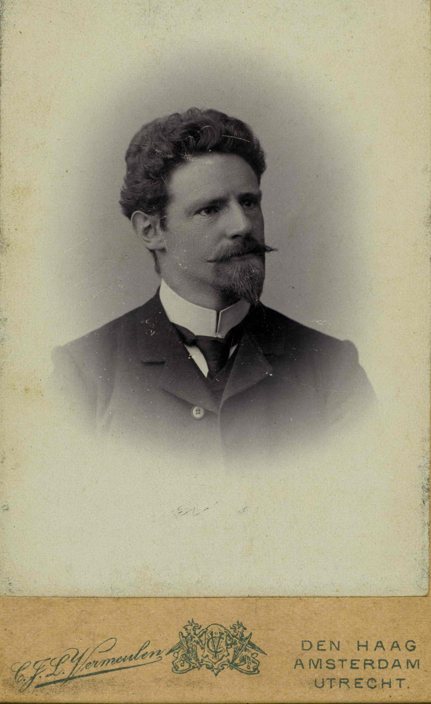 Carte de visite van landschapsschilder C.H. Hammes